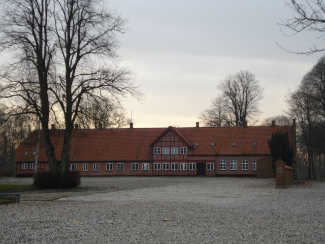 Hevringholm estate, Djursland, Denmark